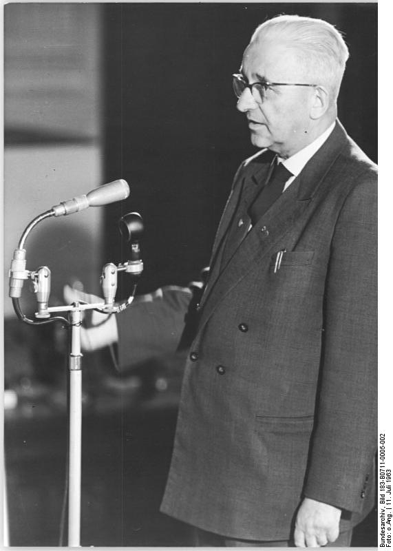 Oberstes Gericht, Globke-Prozess, Aussage, Bernhard Benedikt Zentralbild 11.7.1963 3. Tag des Globke-Prozesses. Vor dem 1. Strafsenat des Obersten Gerichts der DDR in Berlin, wurde am 10. Juli 1963 die Hauptverhandlung gegen Globke fortgesetzt. Eine Reihe von Zeugen machten ihre Aussagen. UBz: Der ehemalige Hochschullehrer Professor Bernhard Benedikt bewies als Zeuge, wie auf Grund der Globkeschen "Reichsbürgersetze" "Mischlinge ersten Grades" drangsaliert wurden.